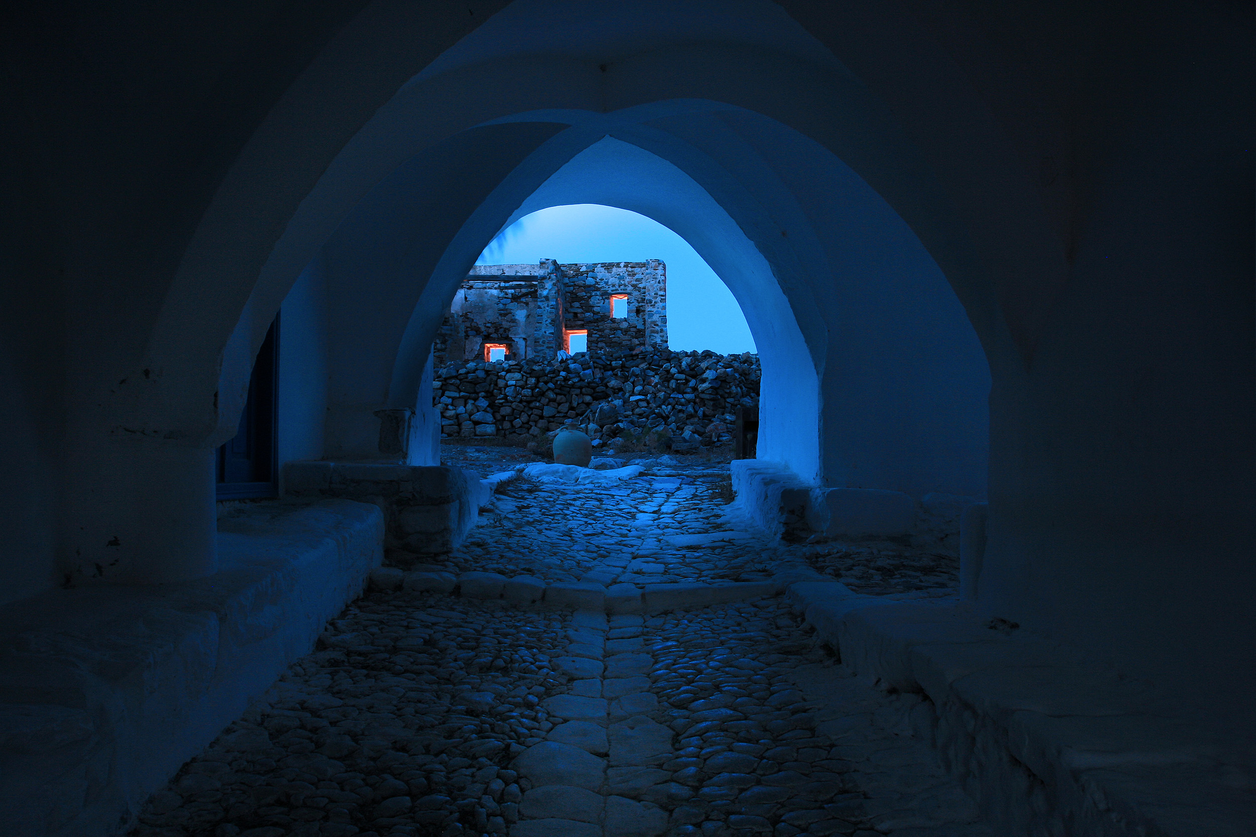 Κάστρο Αστυπάλαιας«Κάστρο Αστυπάλαιας»